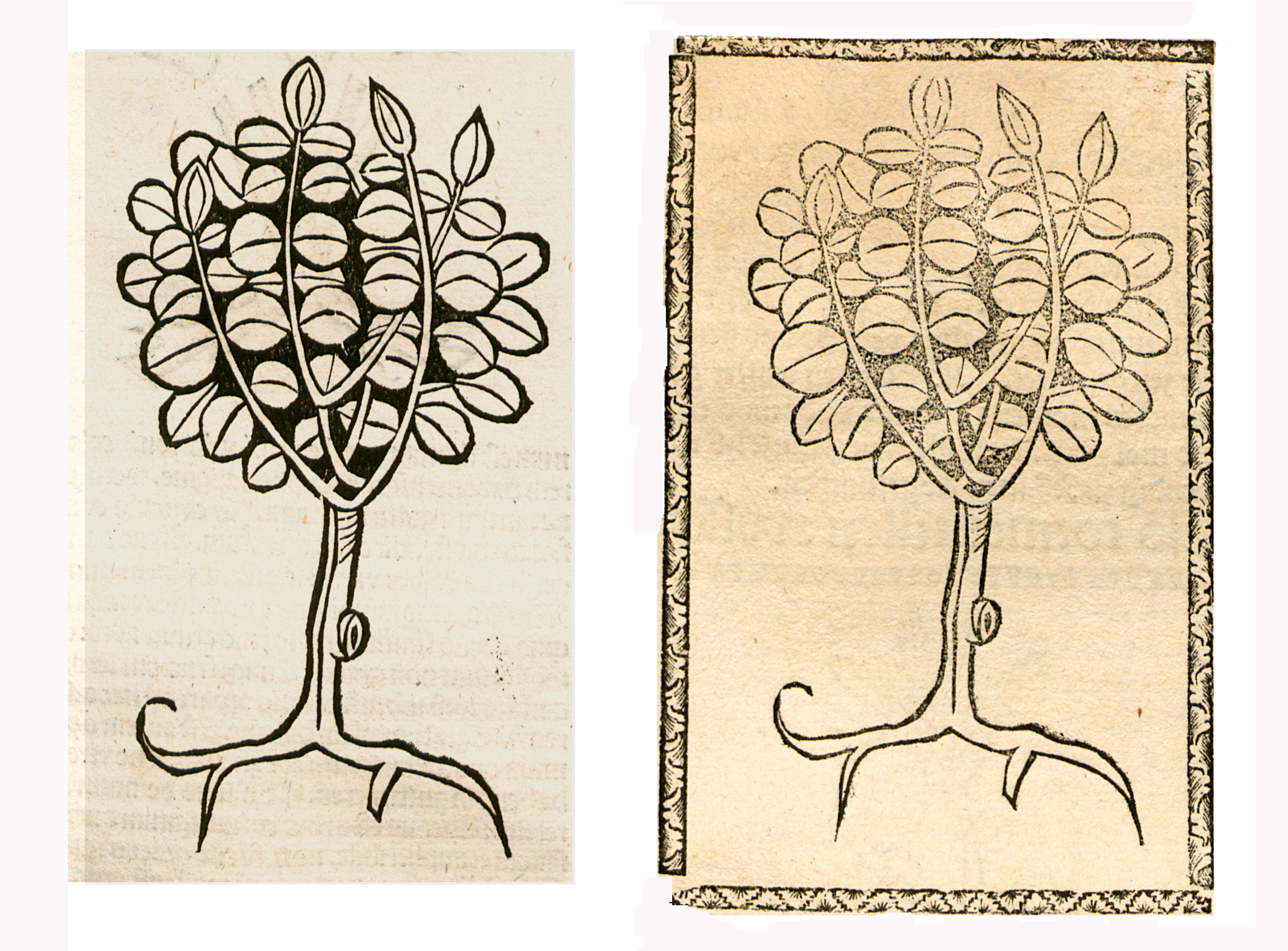 Abbildung vonː Spindel Boum (Euonymus europaeus)